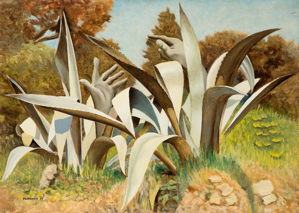 Michelangelo Perghem Gelmi, 1977, olio su tavola, cm. 50x70